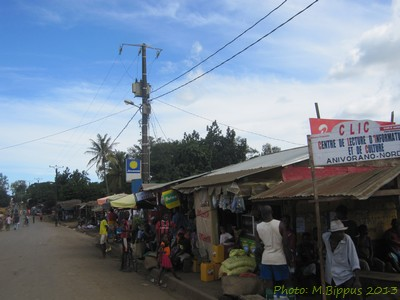 Anivorano-Nord, Diana, RN6